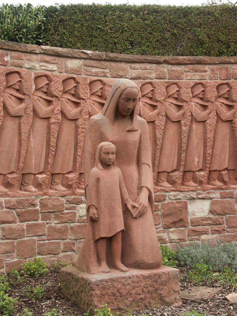 War Memorial - Krieger-/Kriegsopferdenkmal - Mémorial de guerre